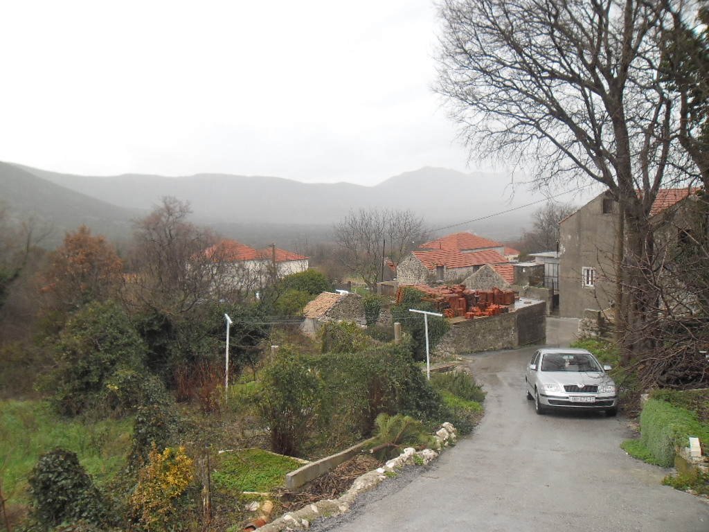 naselje Boljenovići u Ponikvama u stonskoj općini, Pelješac